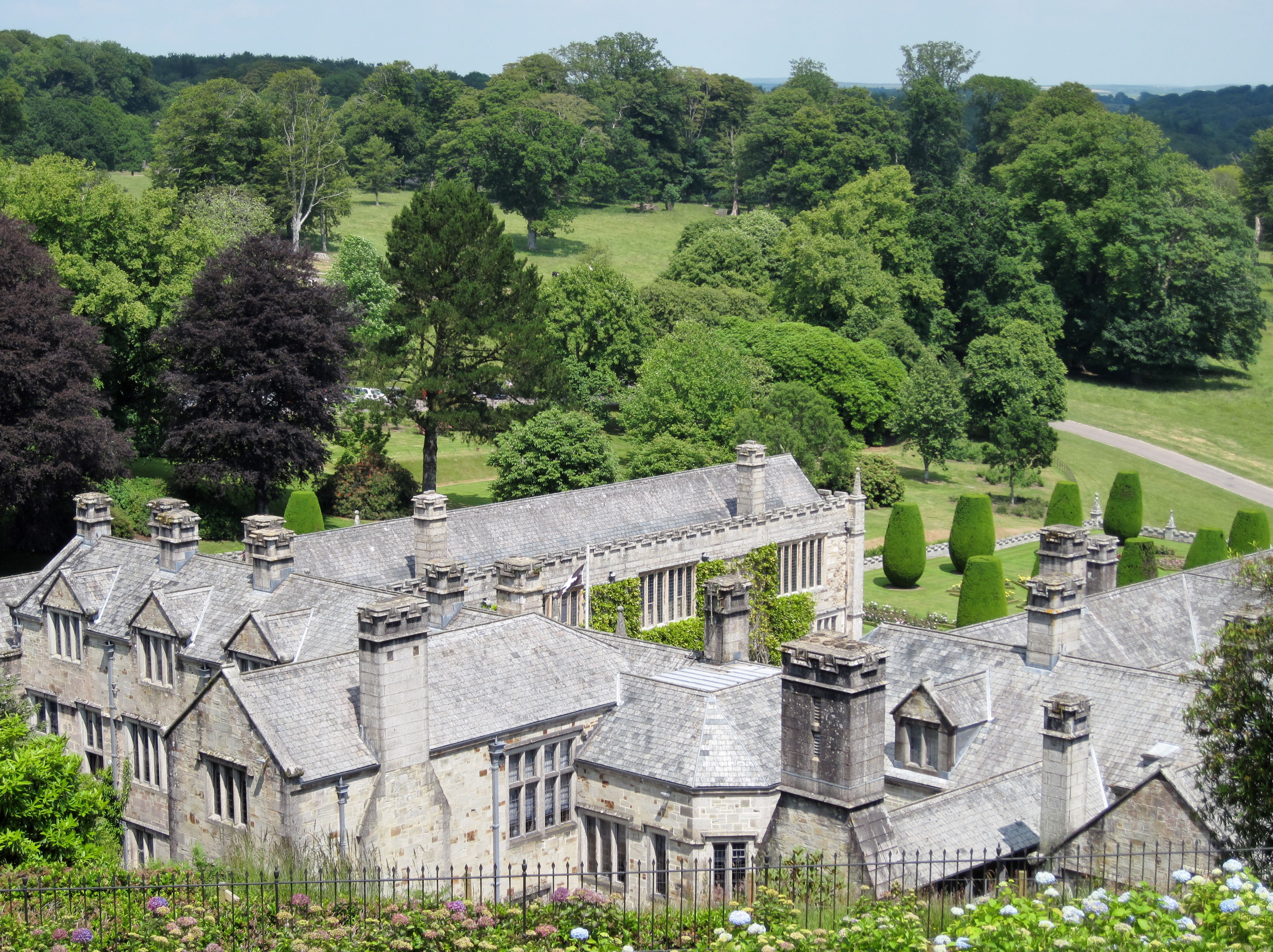 Lanhydrock, Herrenhaus nahe Bodmin in Cornwall, England